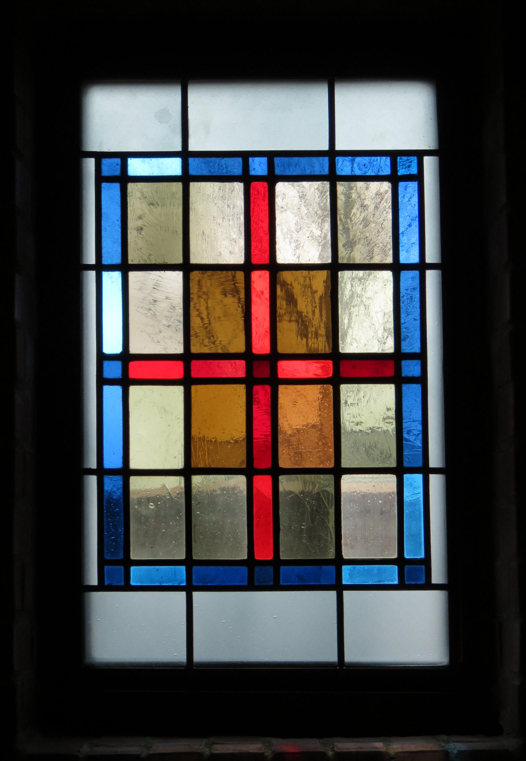 Bild aus der Martinuskapelle in Borschemich (neu)